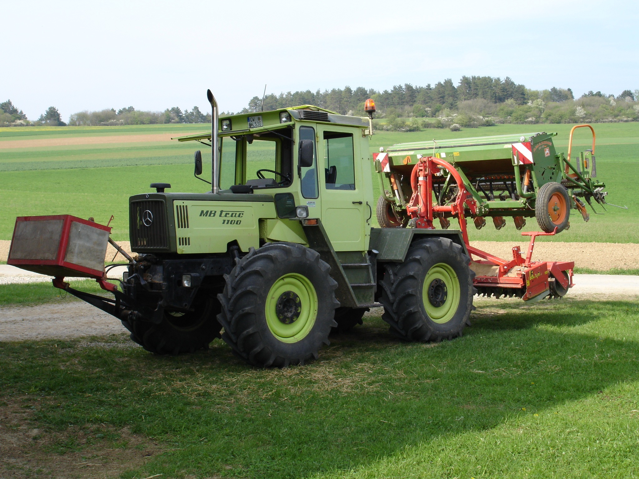 MB trac 1100 mit nachgerüstetem Turbo in Deutschland; Frontgewicht, Kreiselegge mit Walze, Amazone-Sämaschine